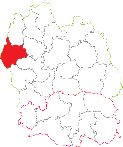 Situation du canton dans le département de la Lozère (France)